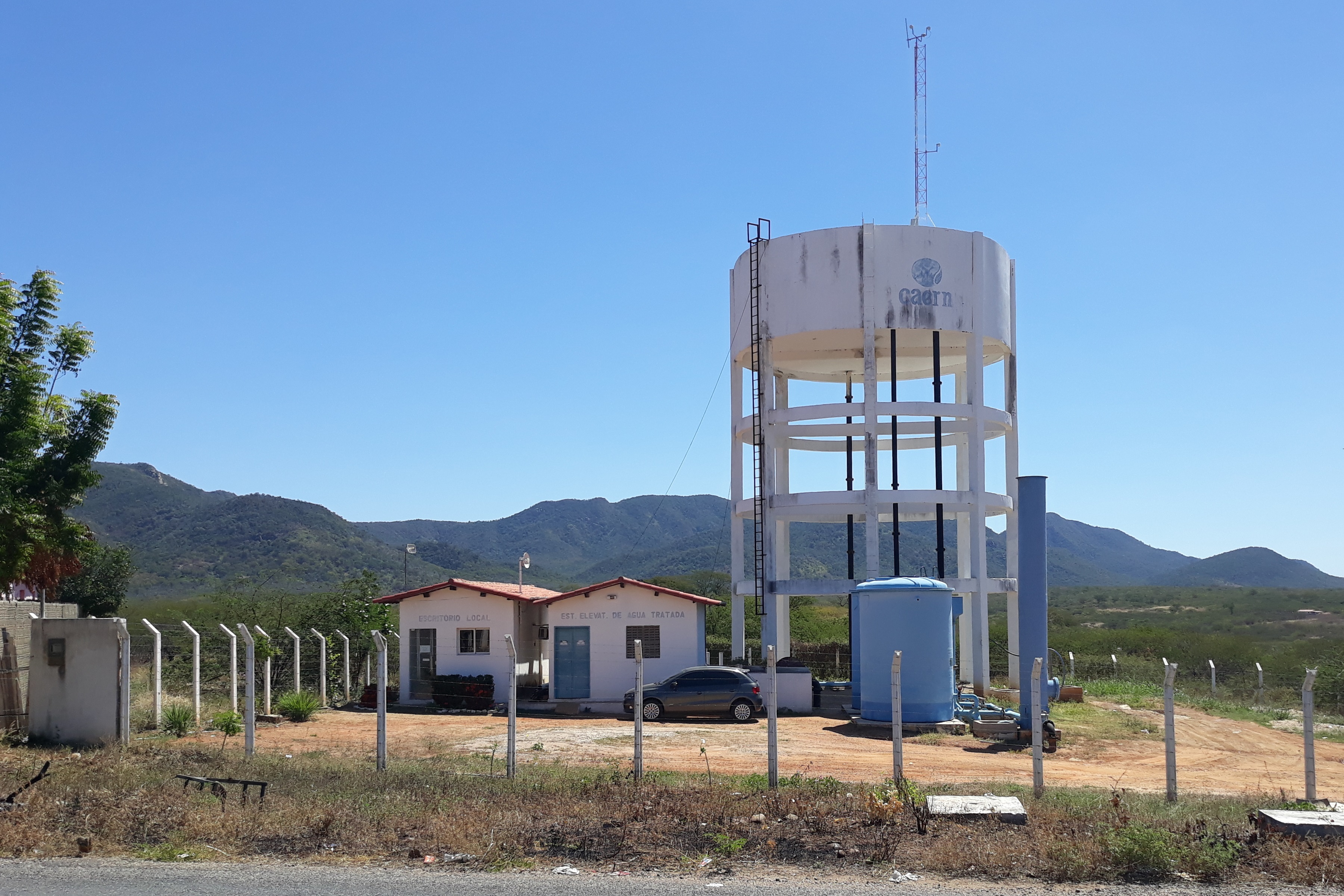 Escritório local e estação elevatória de tratamento de água da Companhia de Águas e Esgotos do Rio Grande do Norte (CAERN) no Encanto (Brasil)